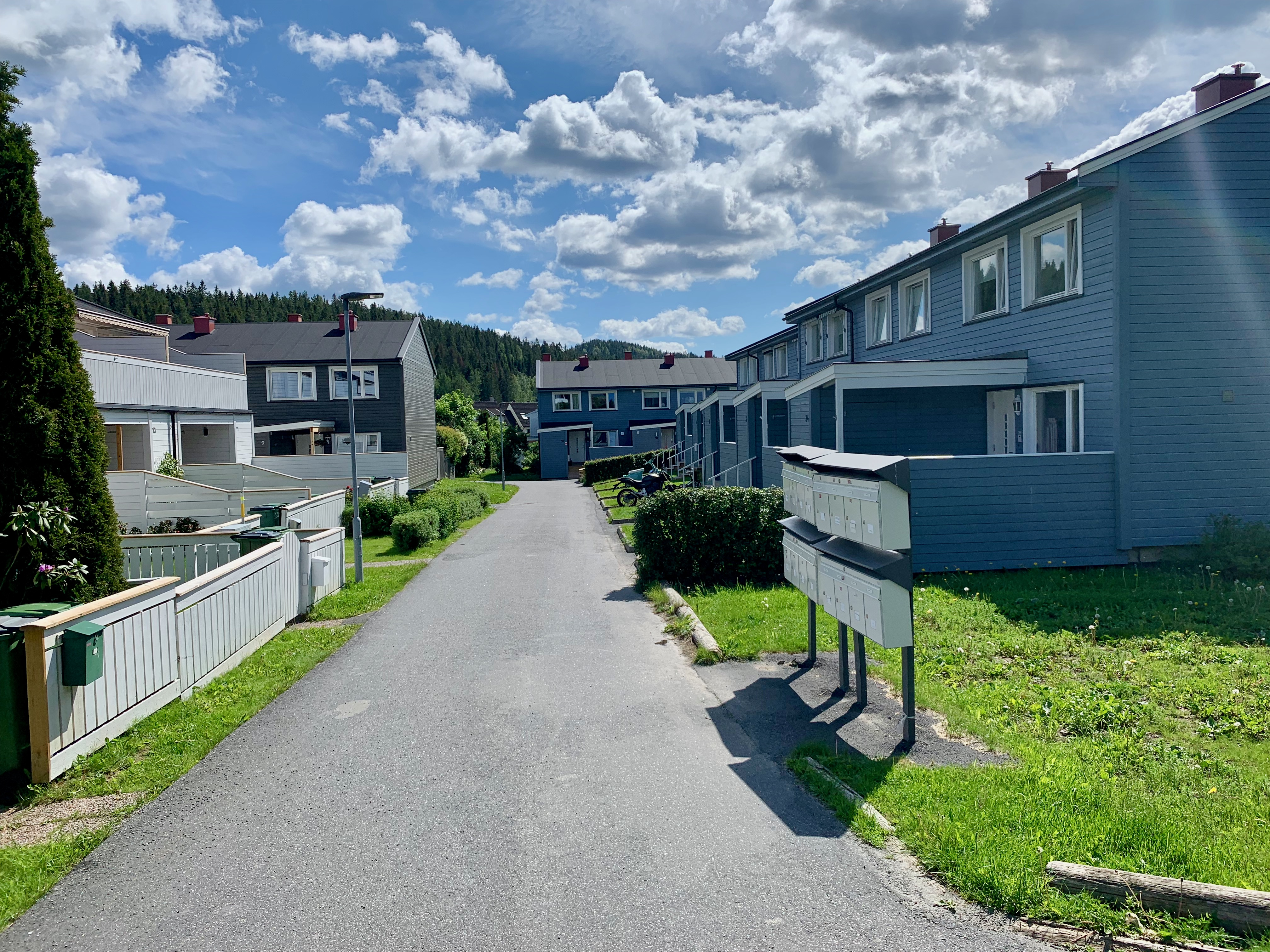 Havrestien. Kurland i Lørenskog.